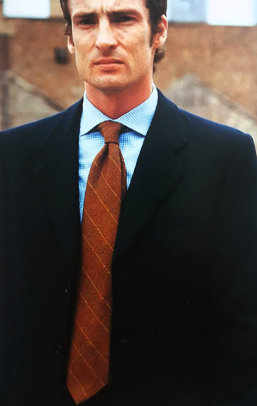 tie